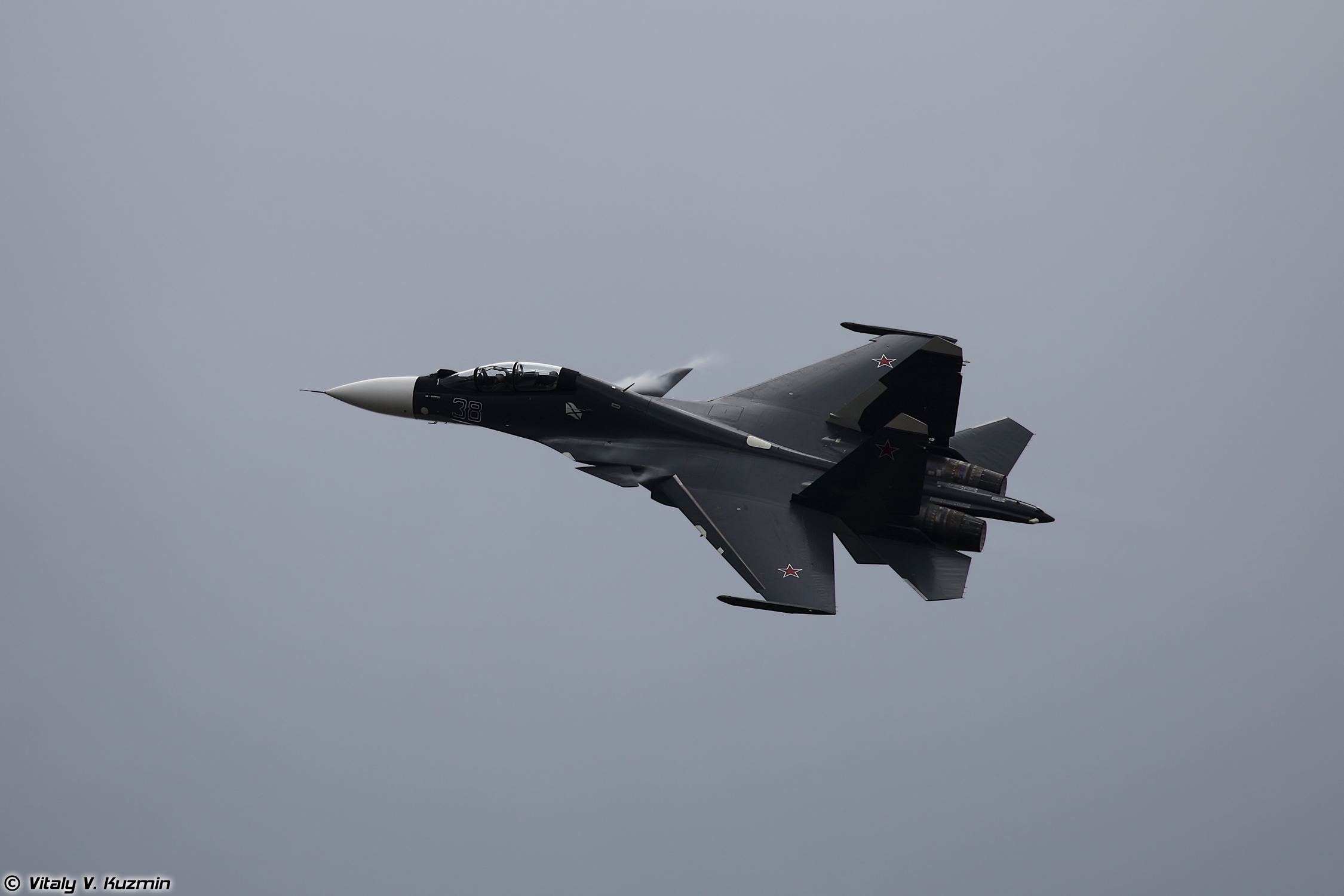 Су-30СМ (Su-30SM)